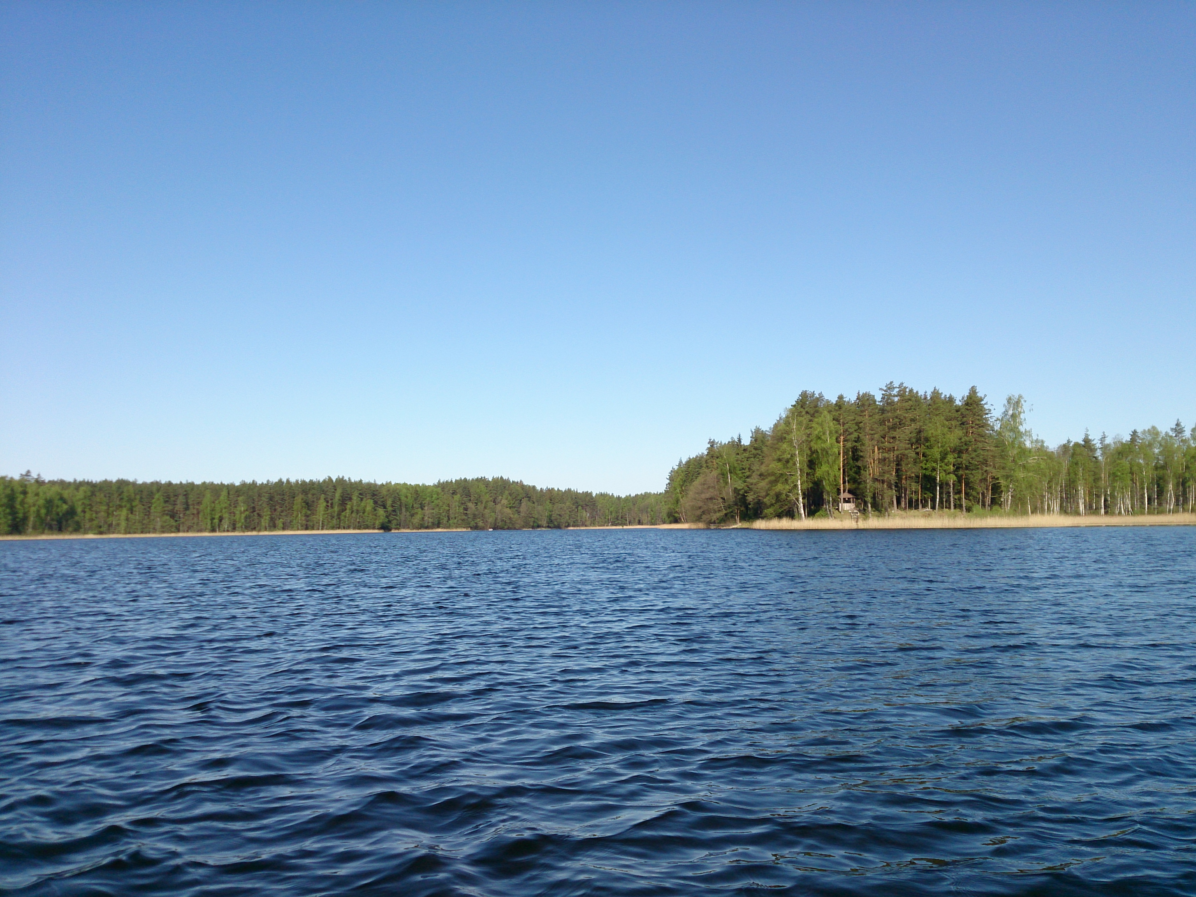 Rušons 09.05.2015